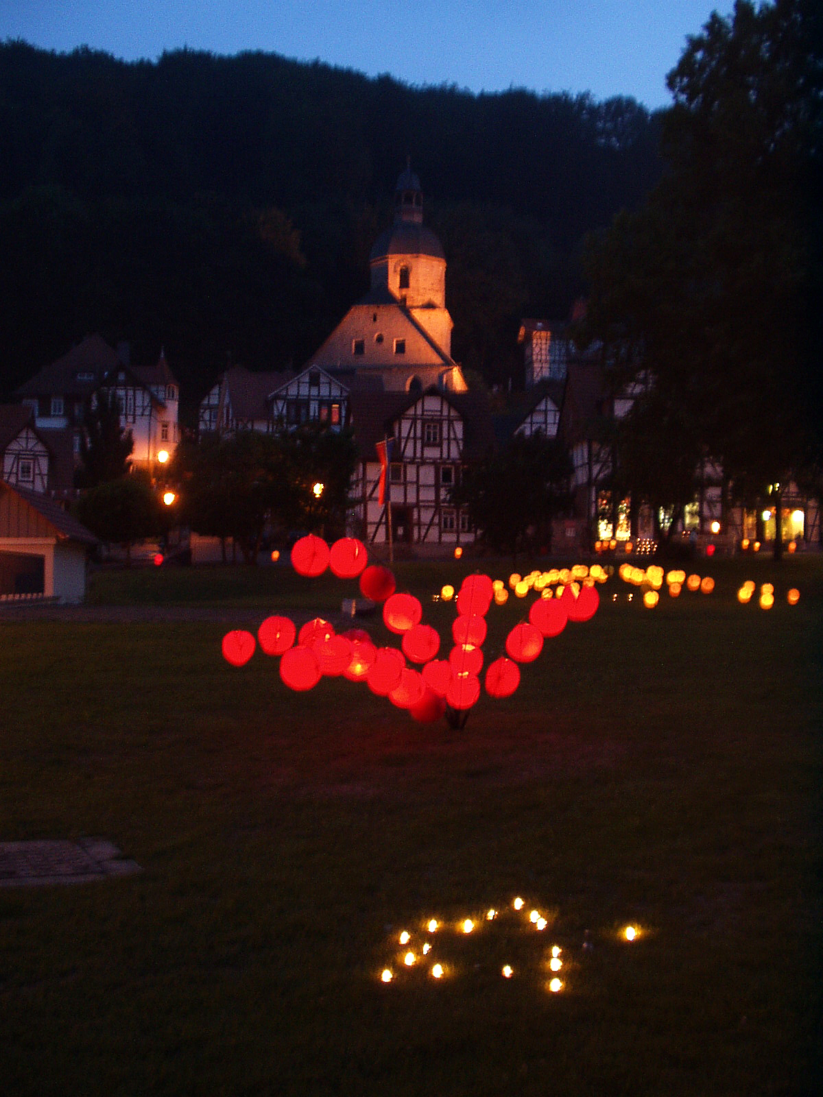 Lichterfest, Bad Sooden-Allendorf, 2007